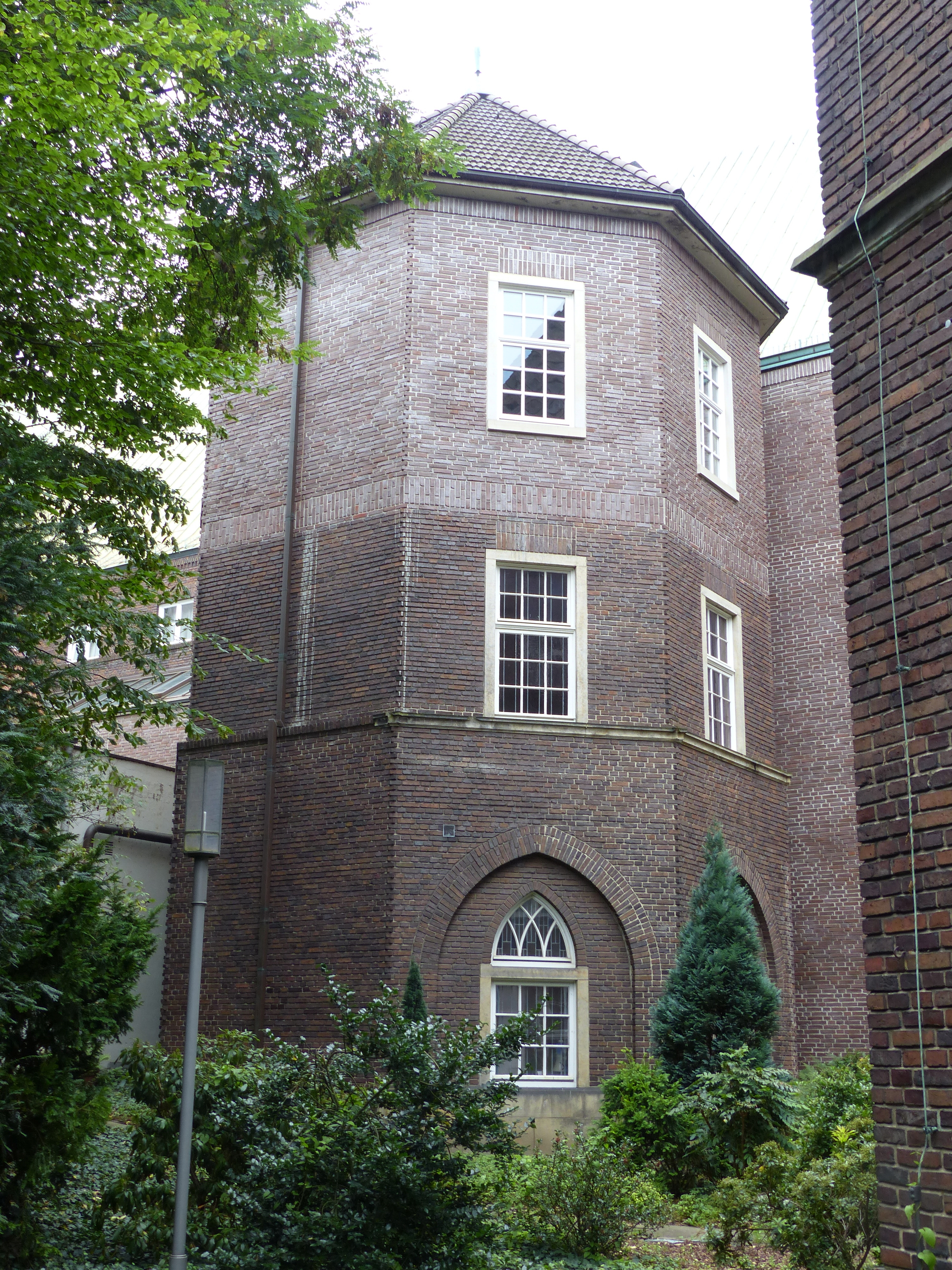 Achteckturm der Bremer Glocke, in Erinnerung an den Achteckturm neben dem alten Domkloster, der die erste „Glocke“ war.